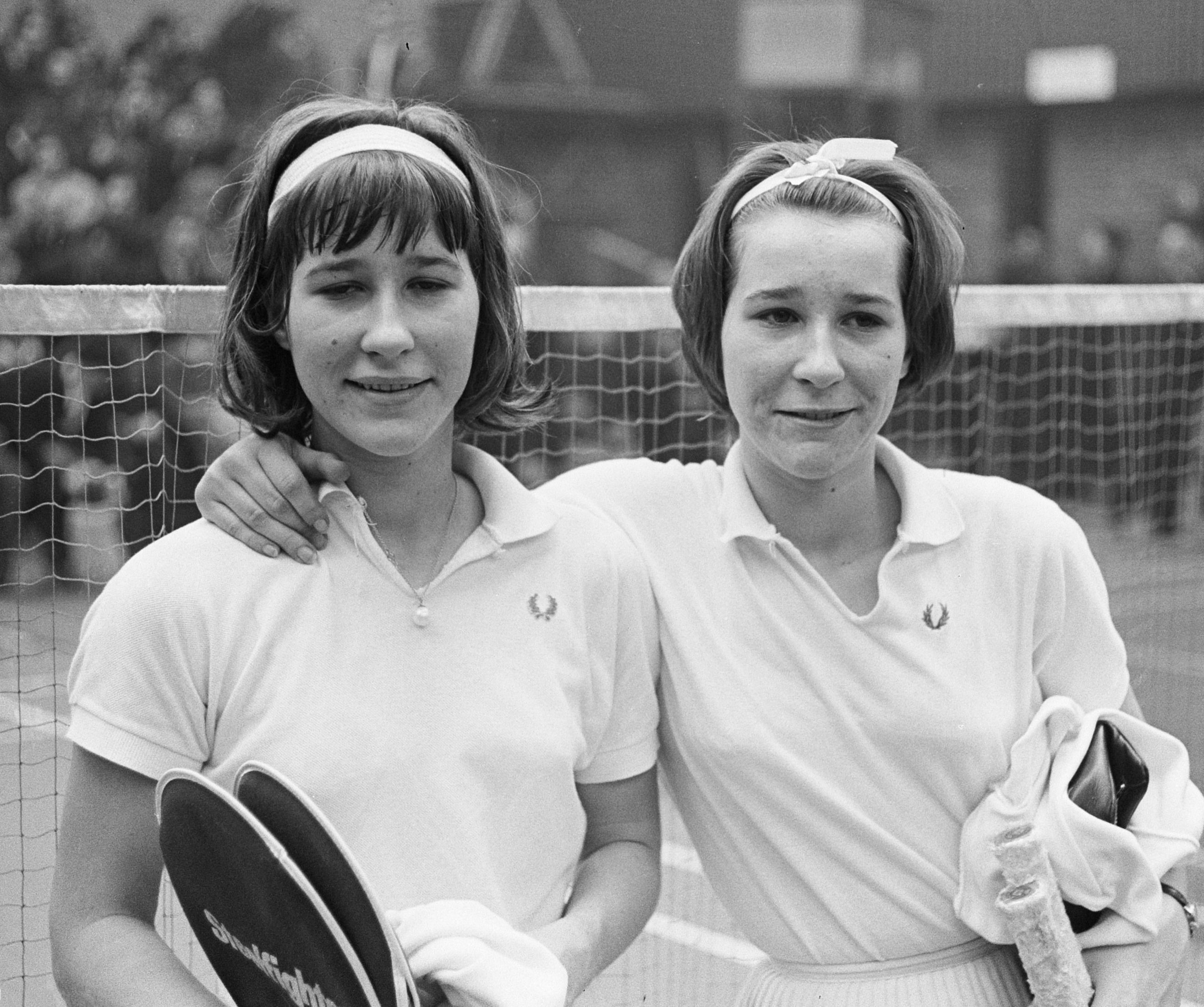 Bente Flindt (later Sørensen, left) and Anne Flindt